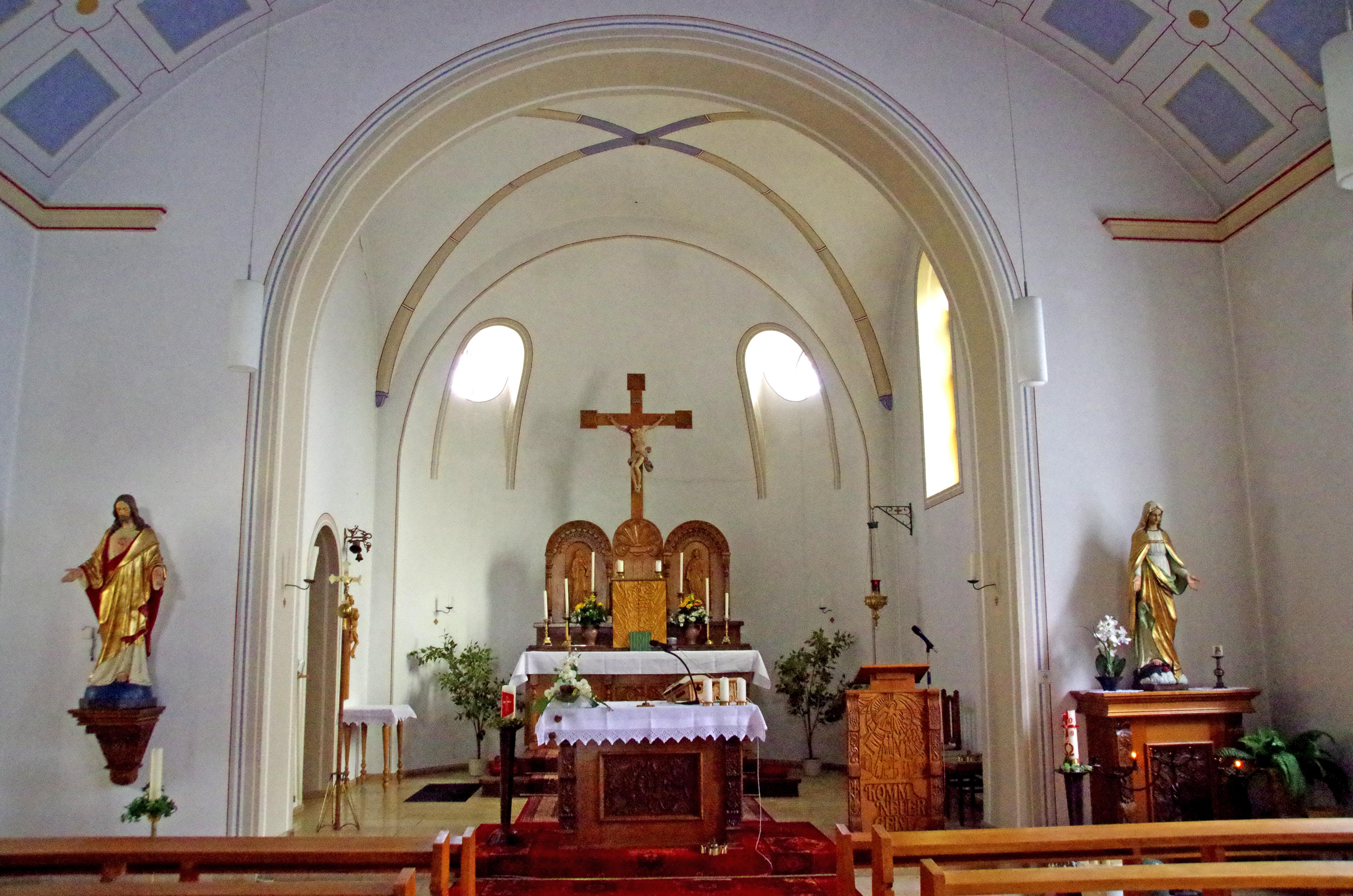 St. Wendelin (Eiserfey), Blick durchs Langhaus zum Altar